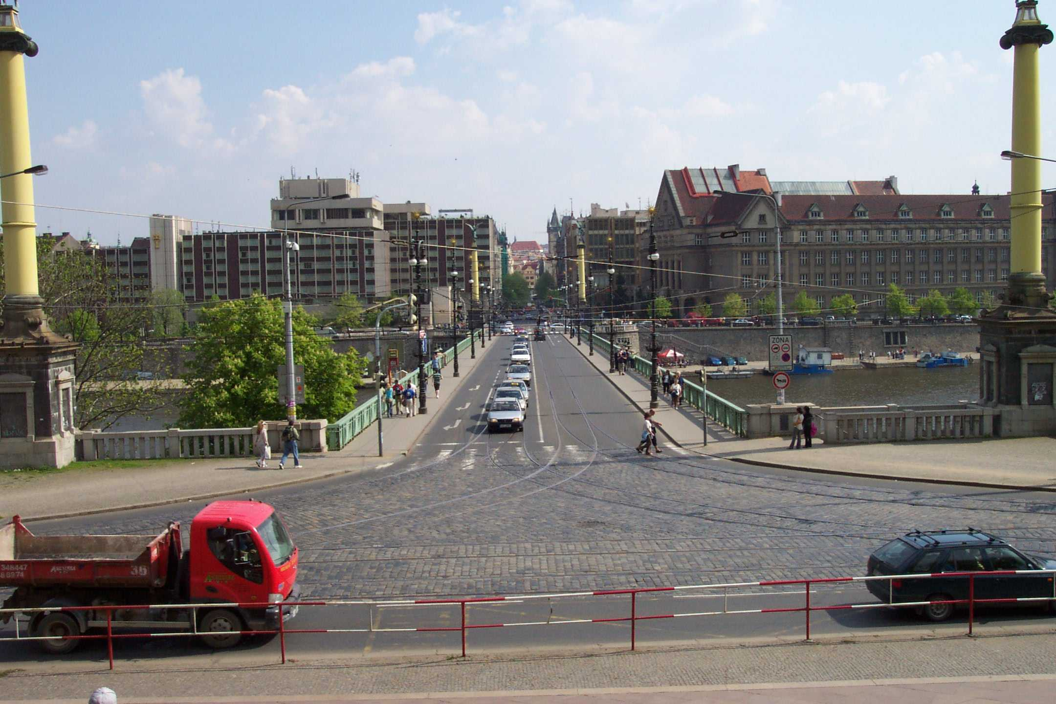 Čechův most in Prague - Čechův most v Praze